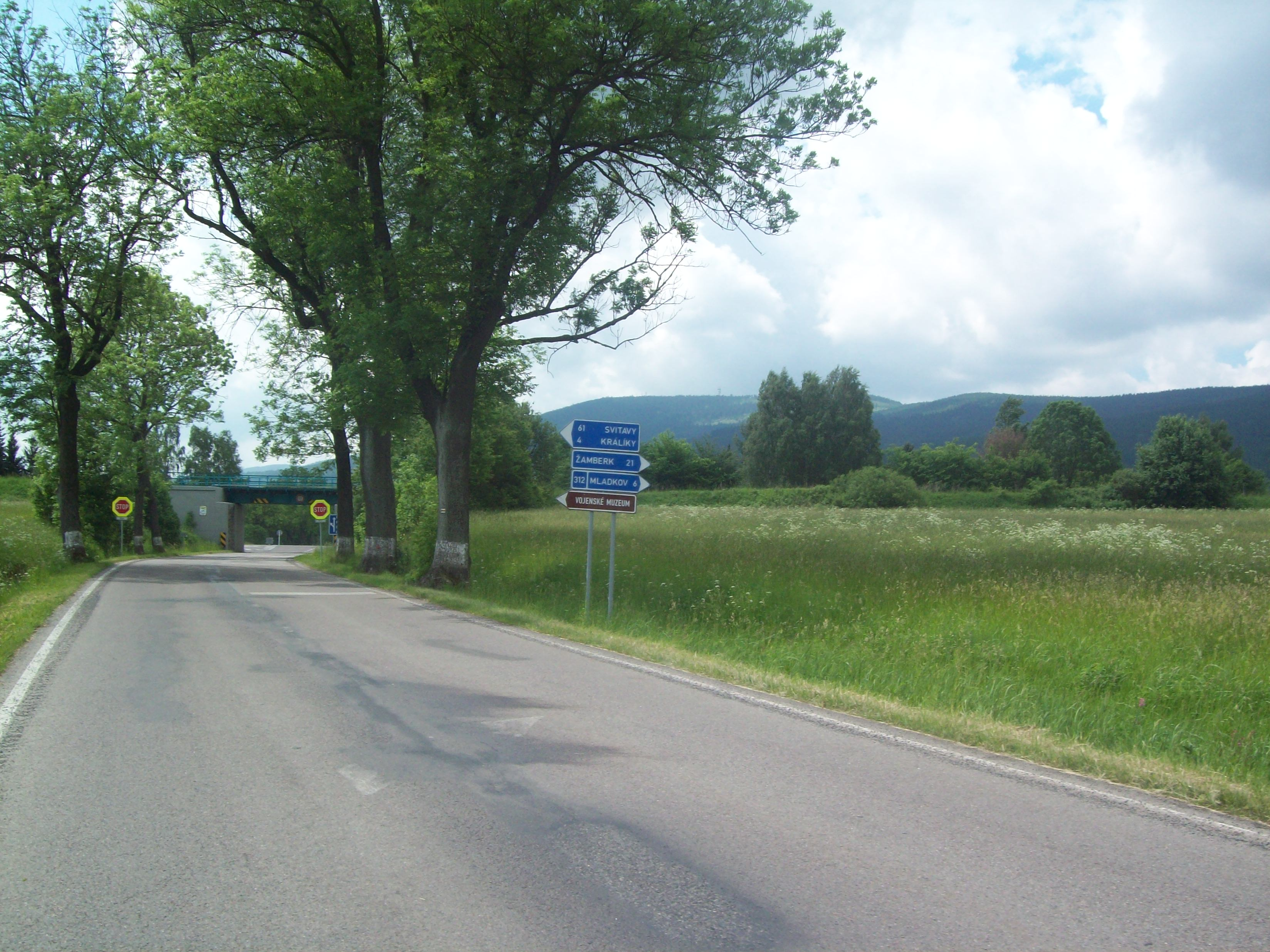 Droga krajowa 43 w Czechach